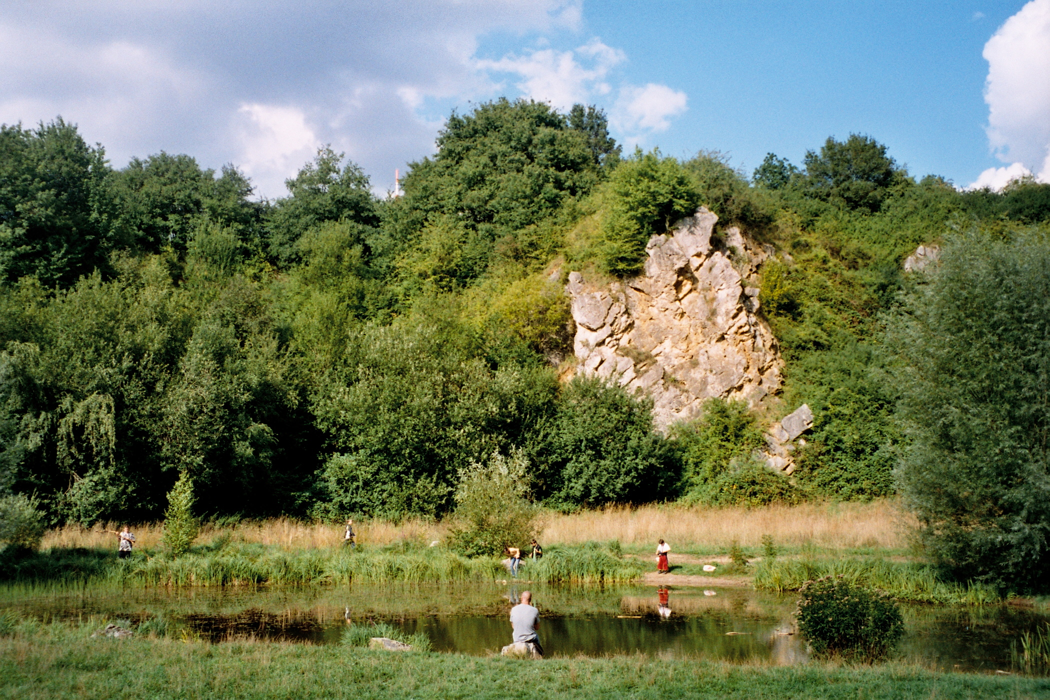 Steinbruch Gehlen in Stolberg (Rhld.) mit Teich und Felswand